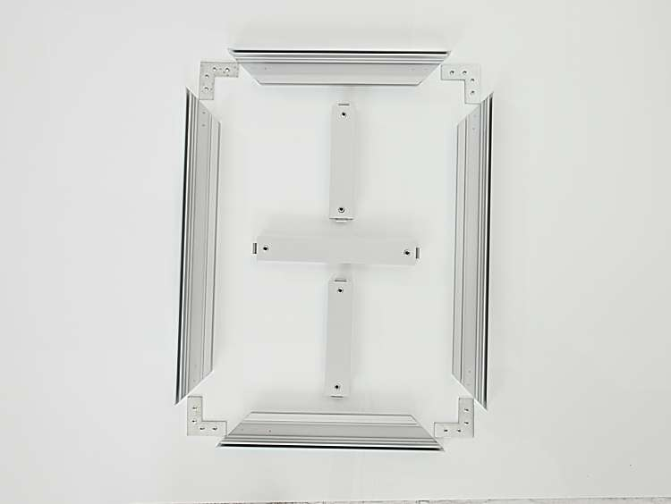 Funktionsweise eines Textilspannrahmens, einzelne Komponenten